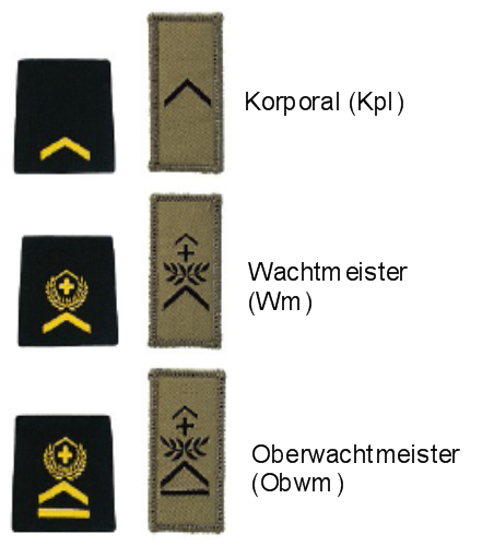 Schweizer Armee - Gradabzeichen Unteroffiziere